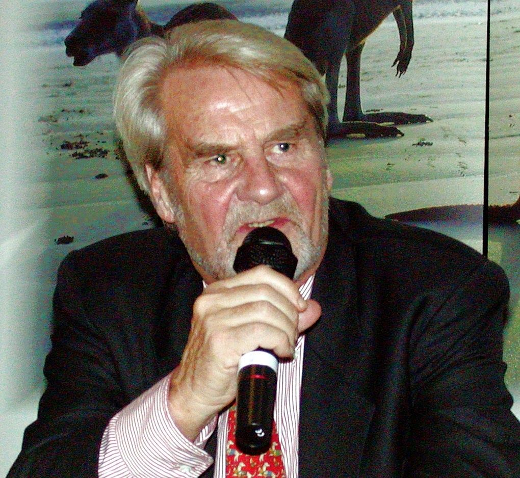 Gerd Ruge bei einem Vortrag in Goslar-Hahnenklee am 27. November 2003